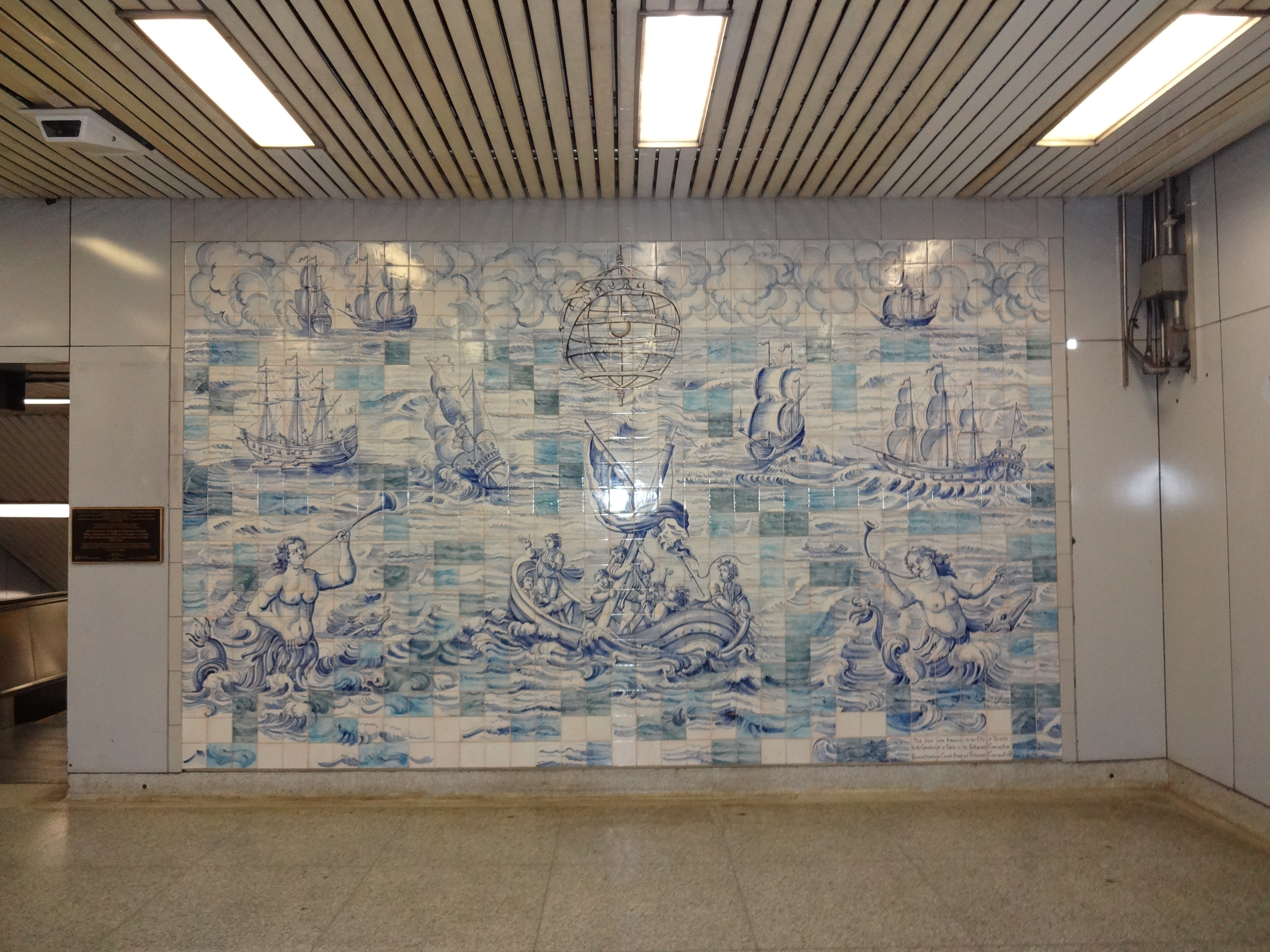 Quadro português dentro de estação de metrô em Toronto, Ontario, Canadá.